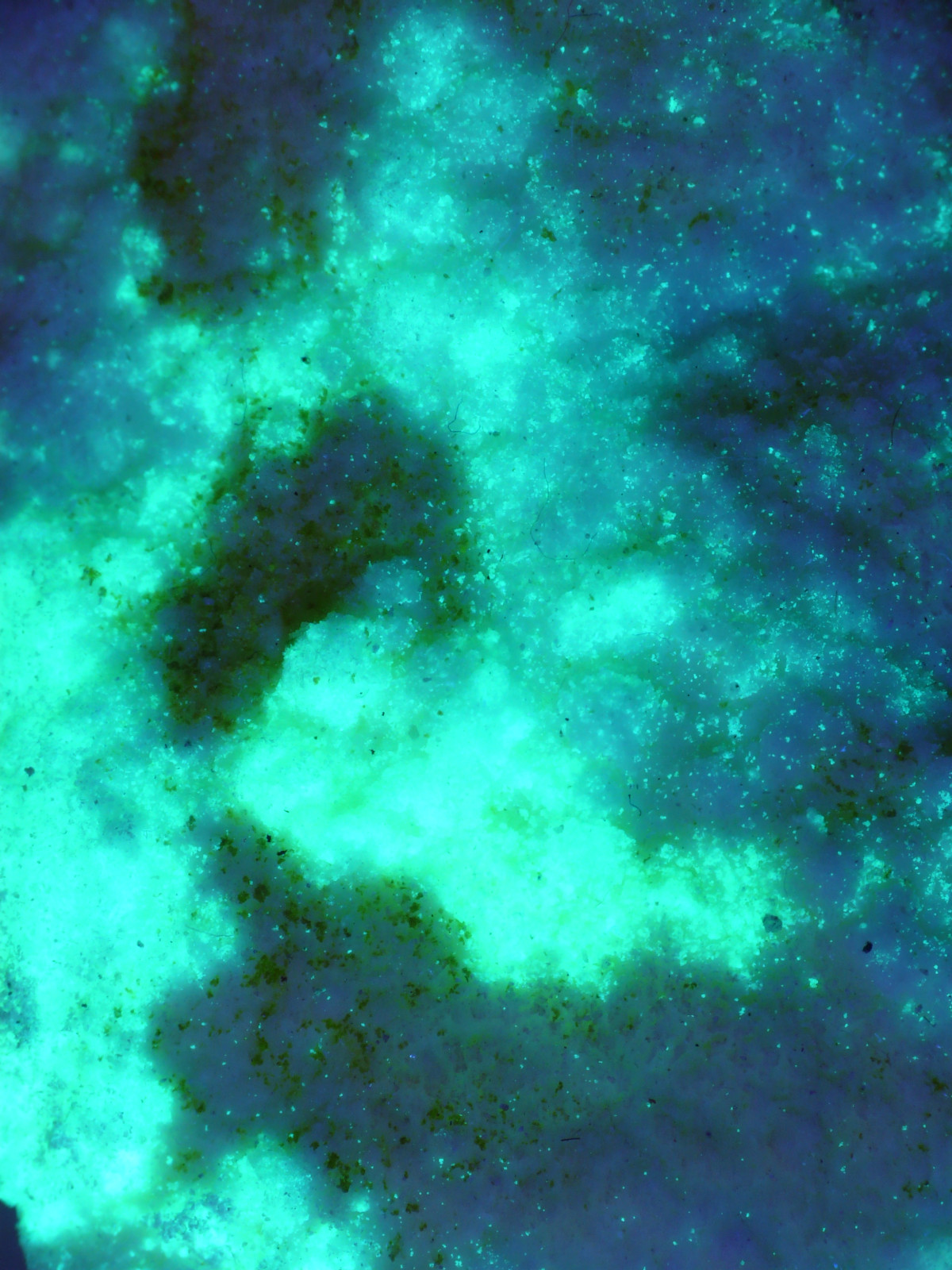 Schroeckingerit in Matrix unter UV Licht, D-Day MIne, Utah, USA, Sichtfeld vertikal: 6mm